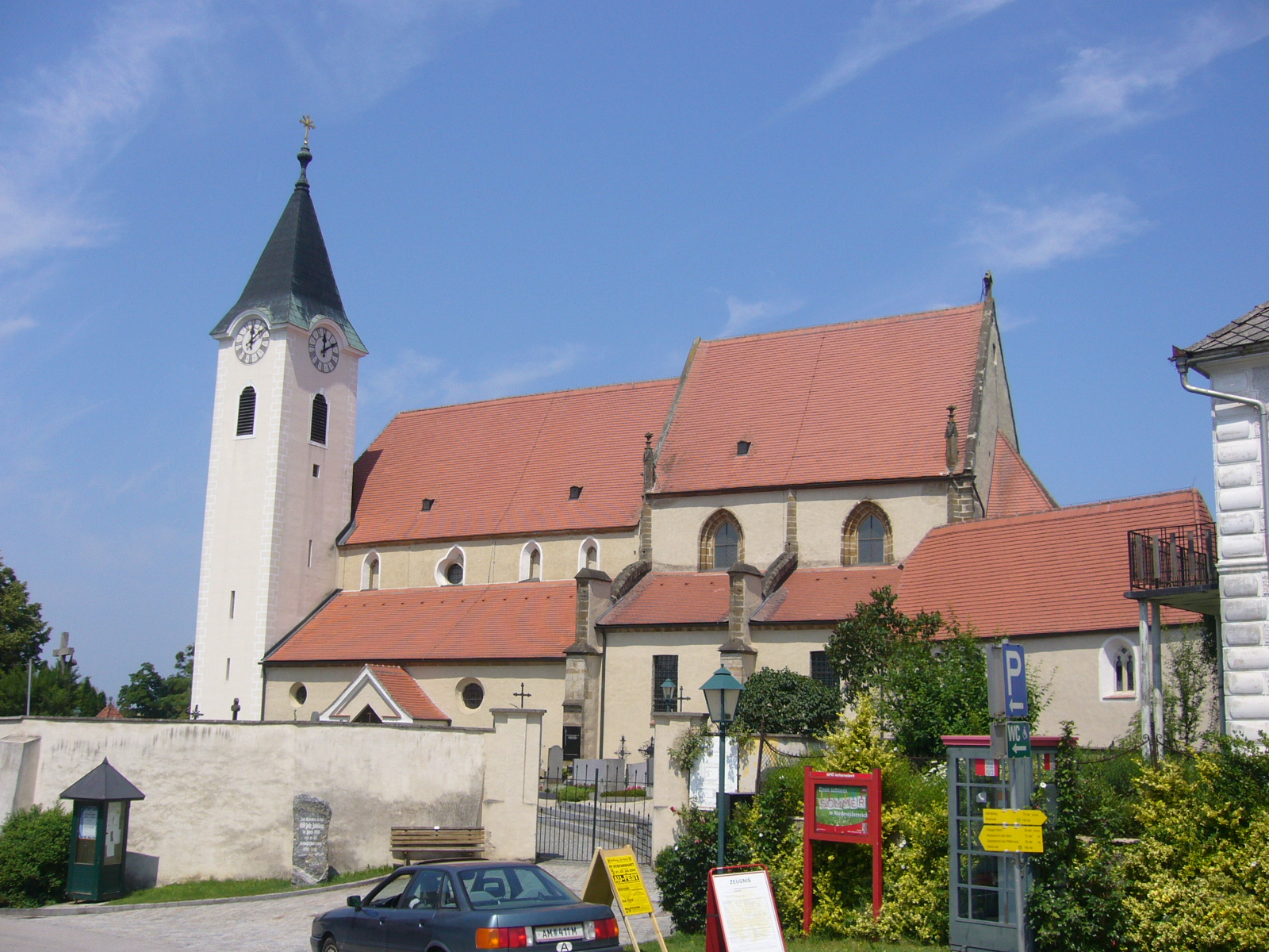 St. Margareten, Stift Ardagger